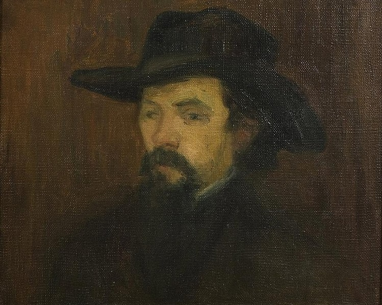 Self-portrait.